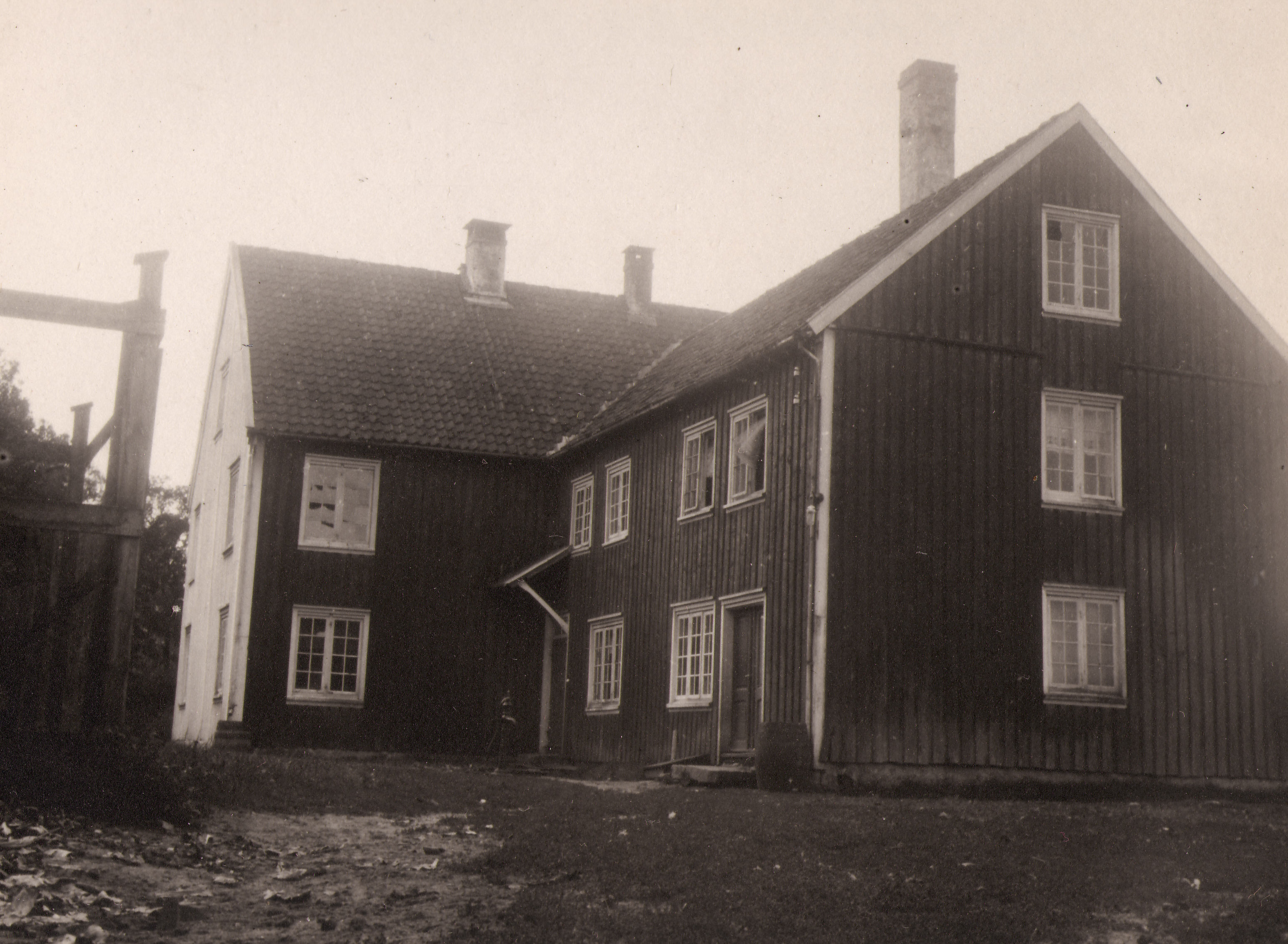 Oddernes prestegård i Oddernes, Vest Agder